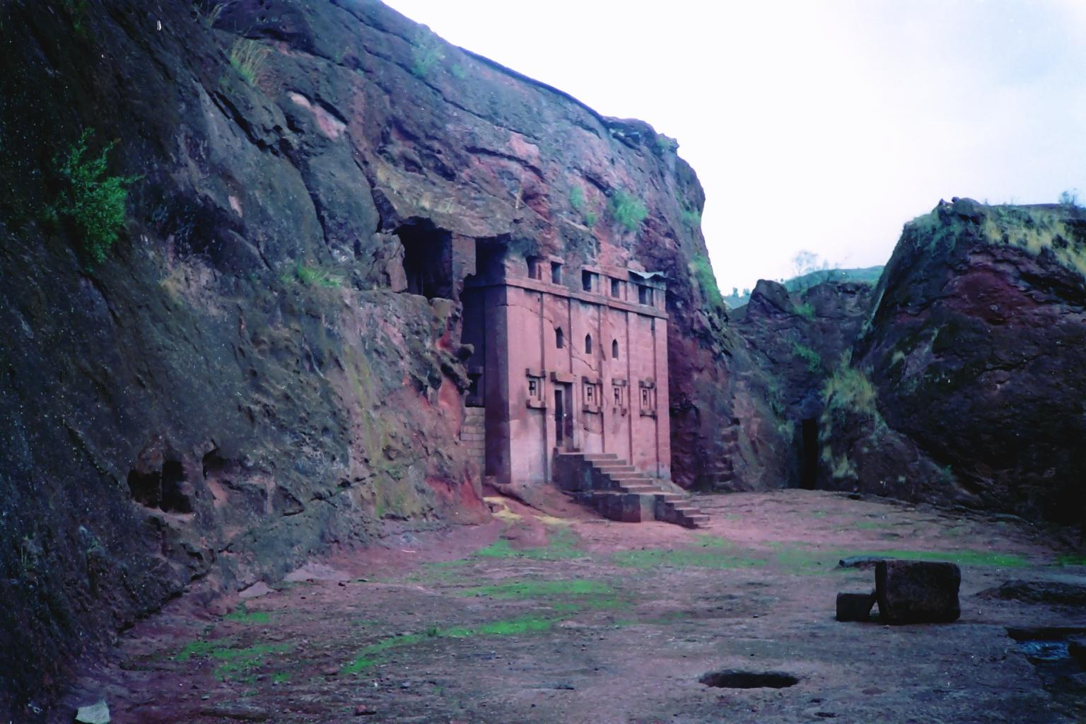 Façade de l'église d'Abba Libanos à Lalibela (Ethiopie), vue de loin